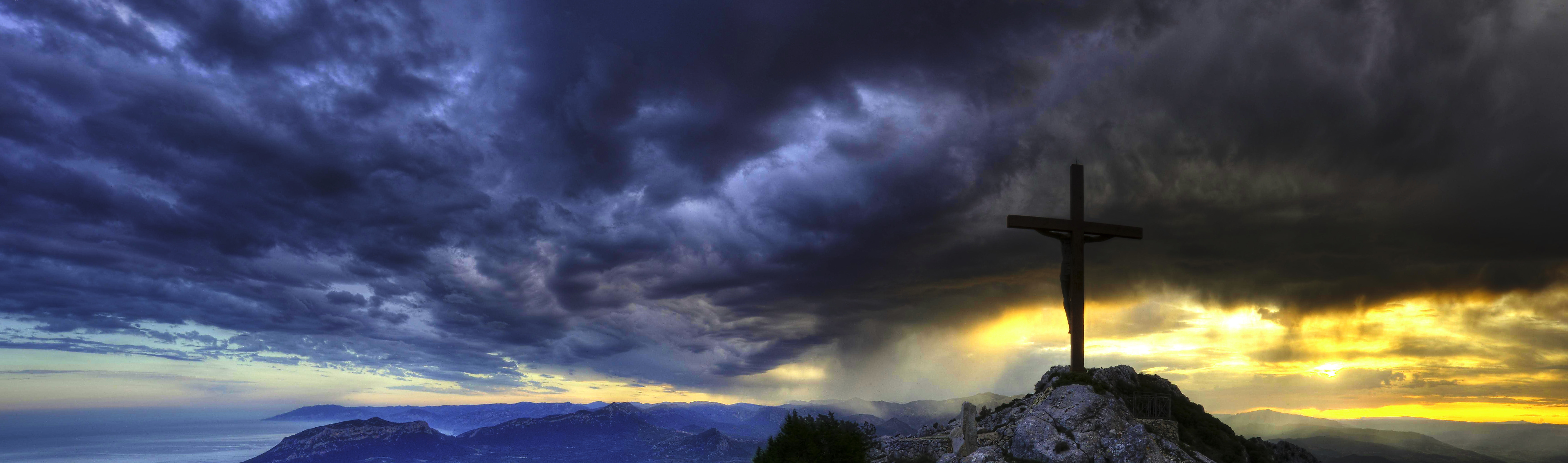 Croce monte Tuttavista Galtelli Sardegna